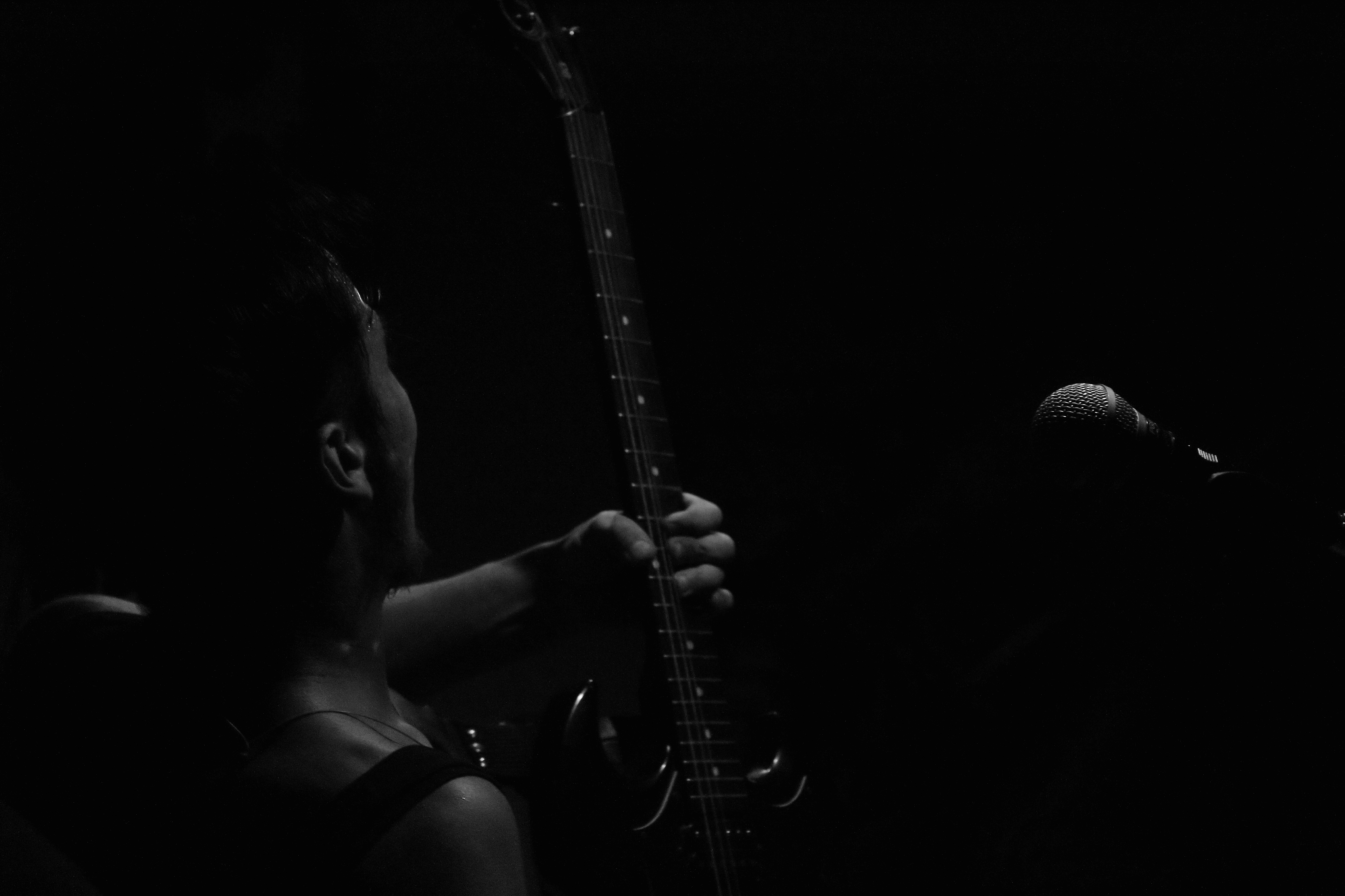 Joven en solo de guitarra.